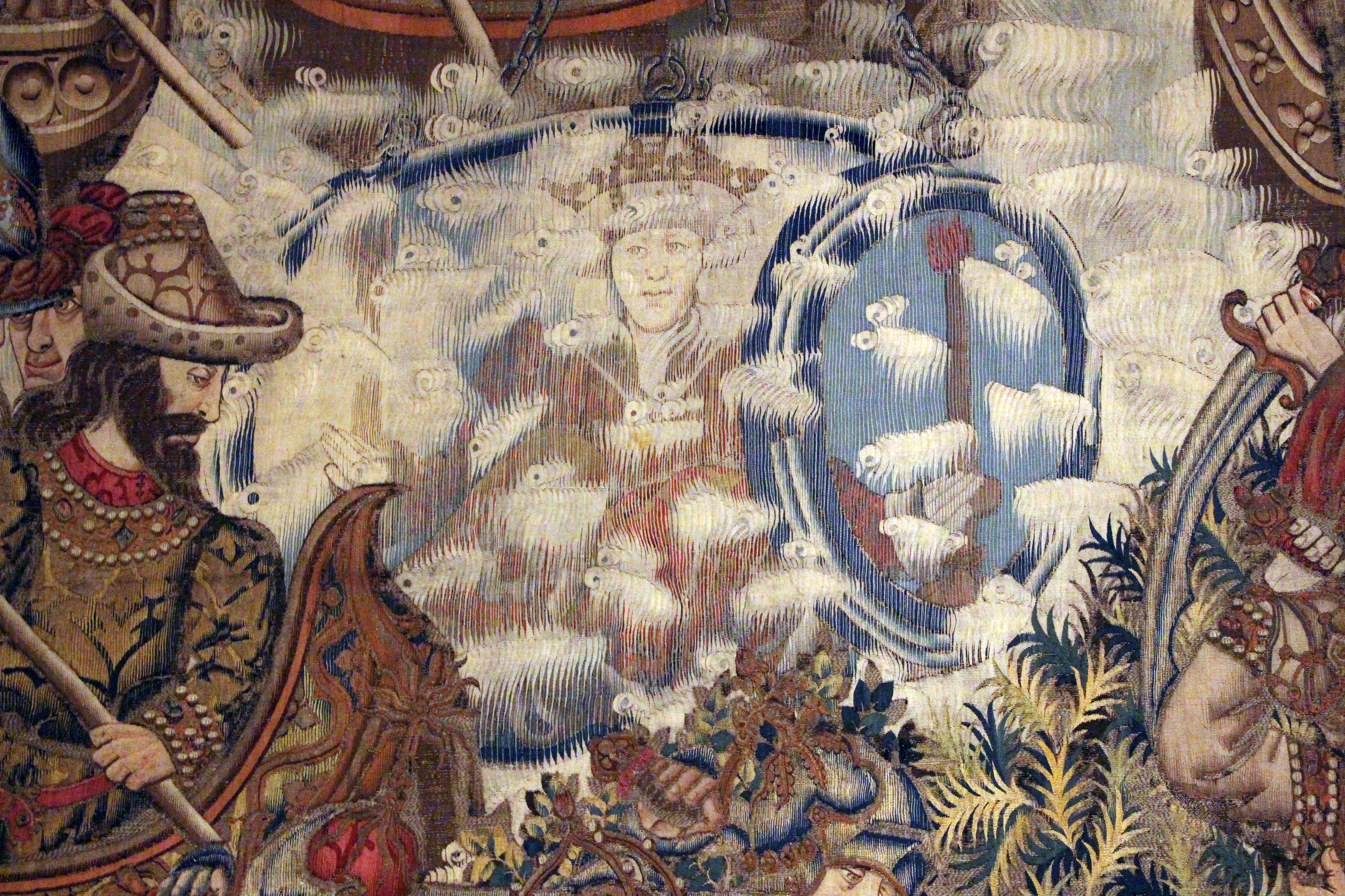 Tournai, arazzo con maturità di alessandro magno, 1460 ca, probab. fatti fare da pasquier grenet per filippo il buono, 28.JPG